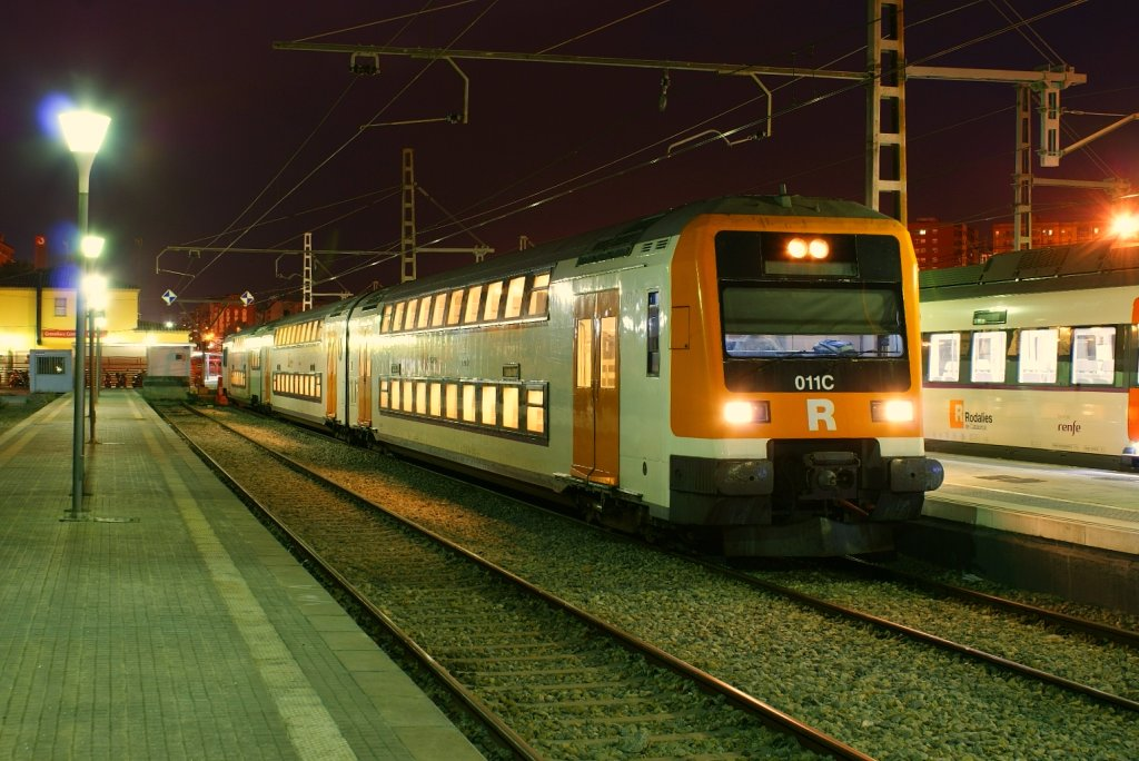 Primera unitat 451 amb els colors de Rodalies de Catalunya que tinc ocasió de fotografiar. Estacionada a la via 5 de l'estació de Granollers-Centre, efectuaria la seva sortida als pocs minuts de realitzar la foto.